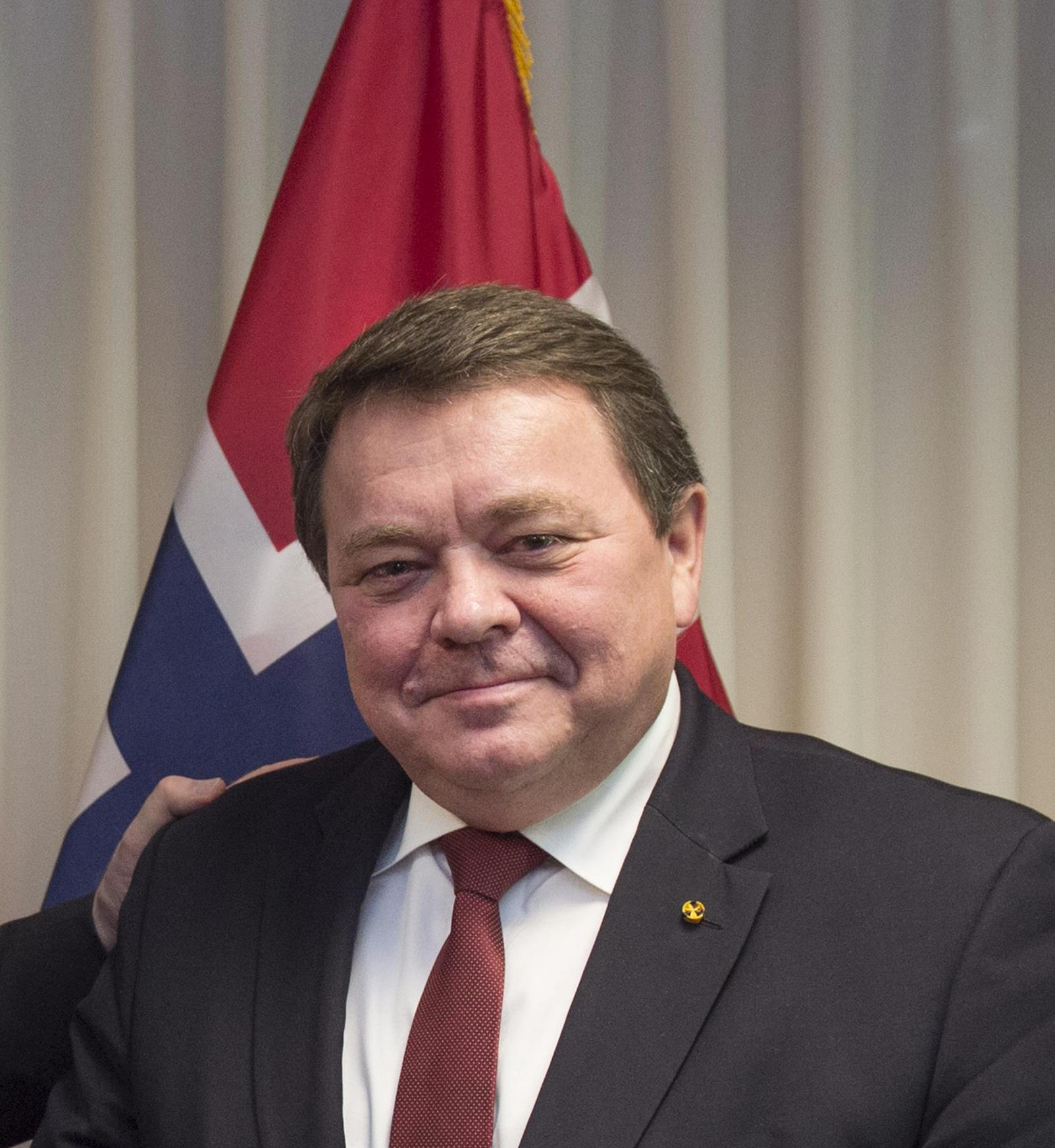 Øystein Bø